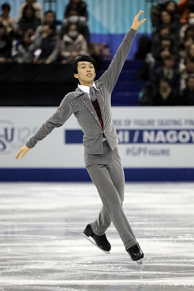 Мицуки Сумото (Япония) на финале юниорского Гран-при 2017-2018